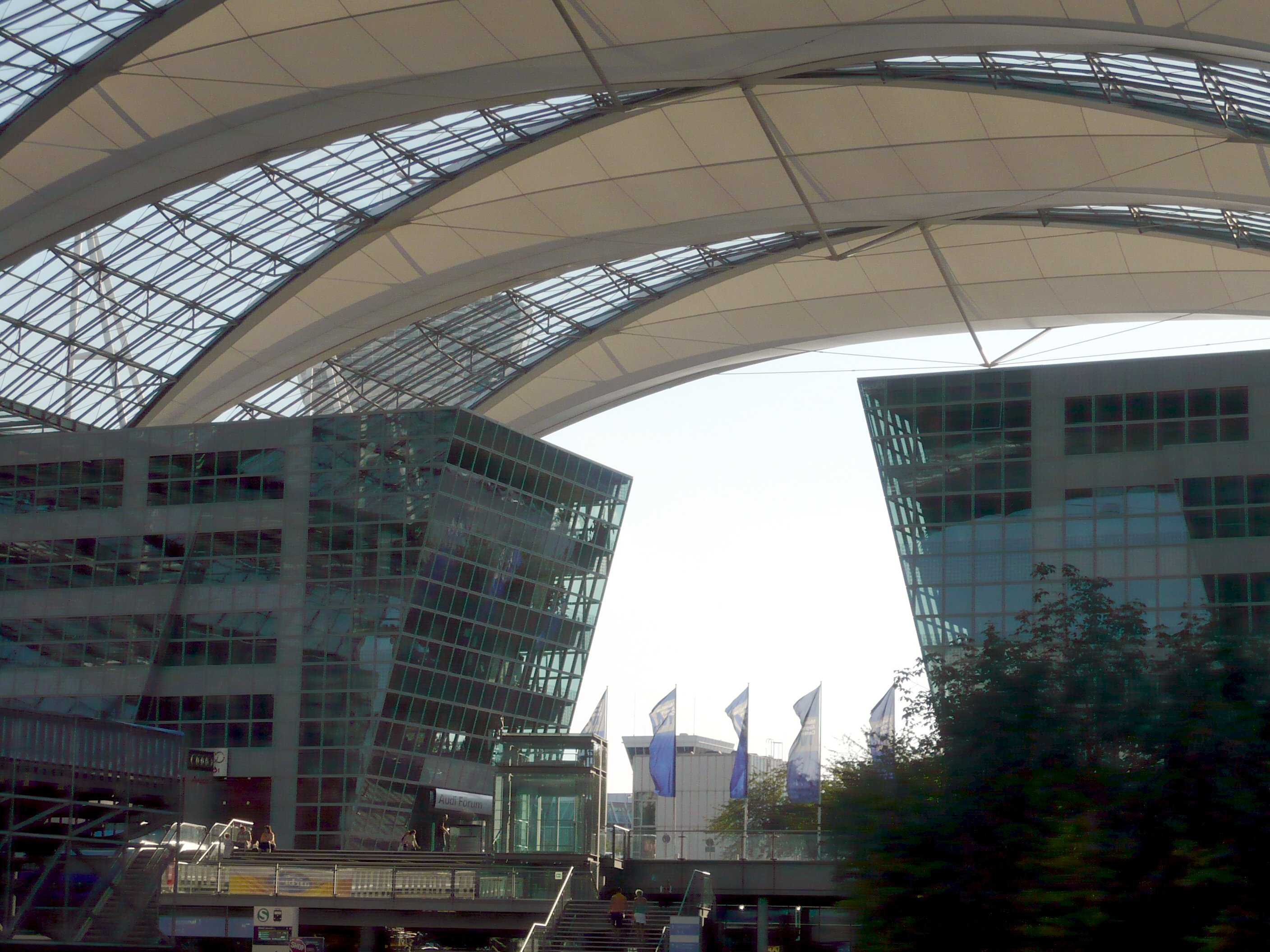 München Airport Center am Flughafen München